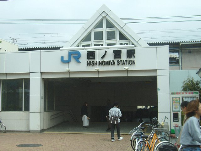 東海道本線 西ノ宮駅（現・西宮駅） 南口駅舎 2006年4月 Bakkai撮影 Category:鉄道駅画像 Category:西日本旅客鉄道の画像 Category:西宮市の画像